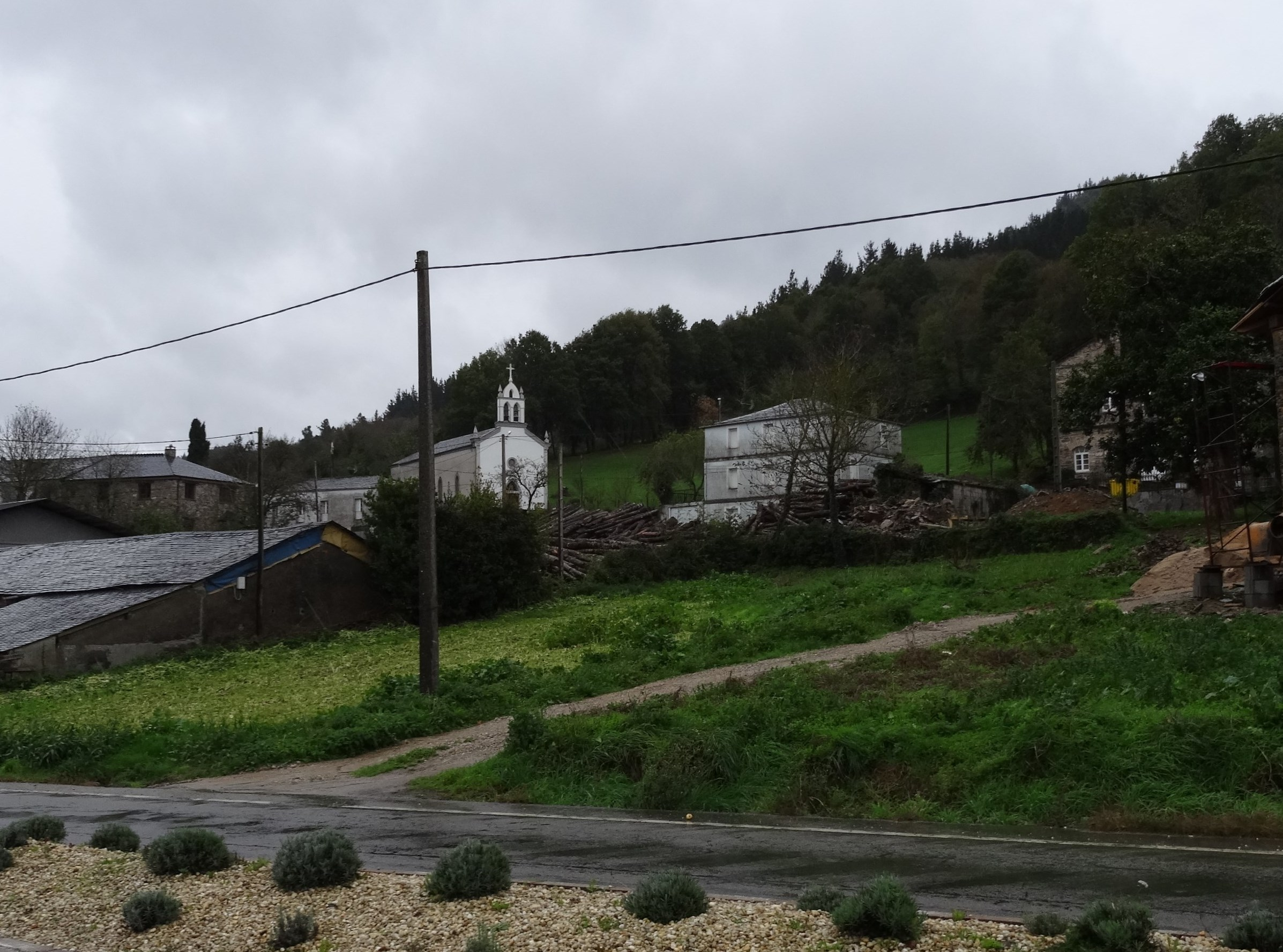 Igrexa no lugar do Cereixal no concello de Becerreá.